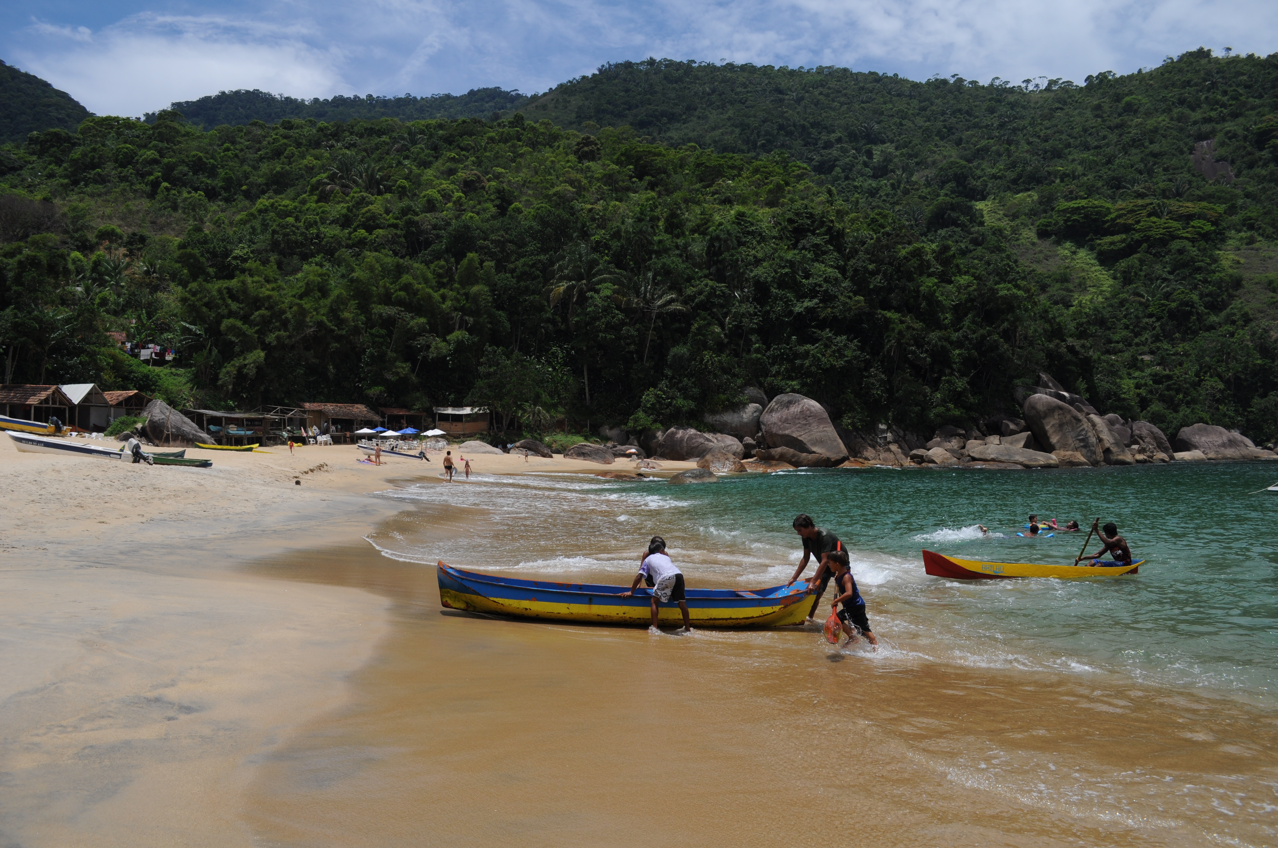 Praia isolada no litoral do Rio de Janeiro, sendo apenas acessível por meio de trilhas ou barco.